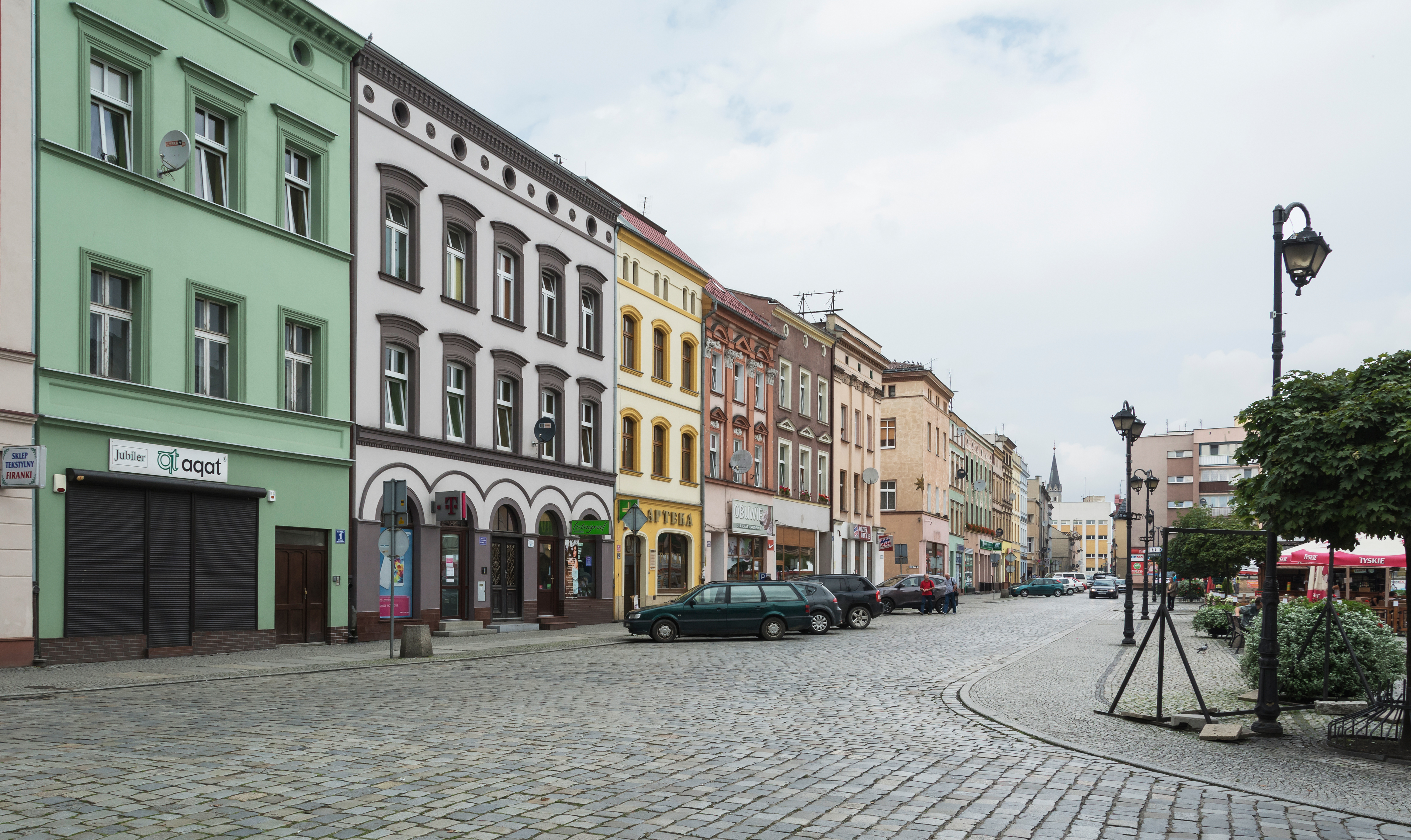 Ząbkowice Śląskie, ośrodek historyczny miasta